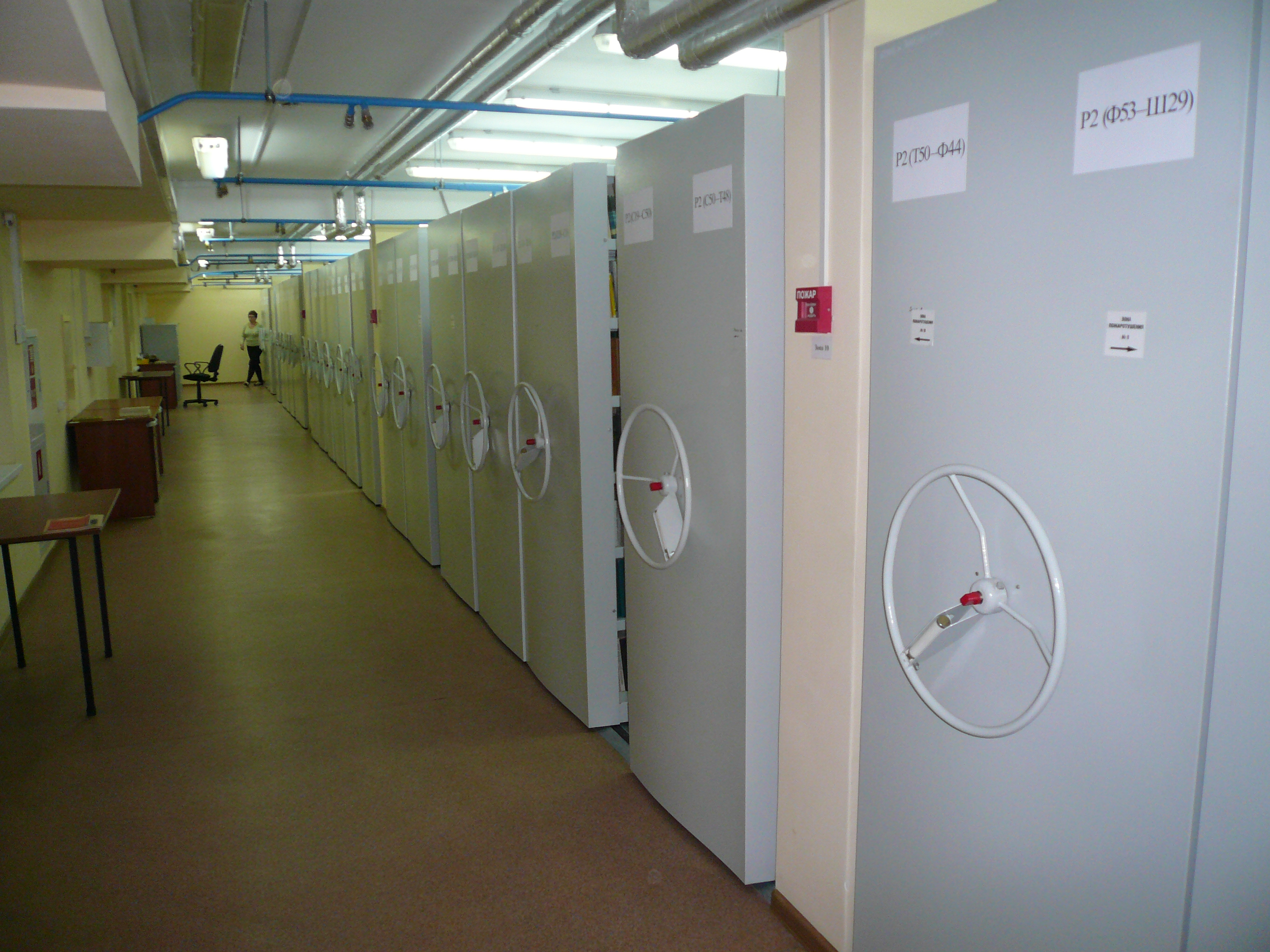 Хранилище Белгородской государственной универсальной научной библиотеки.